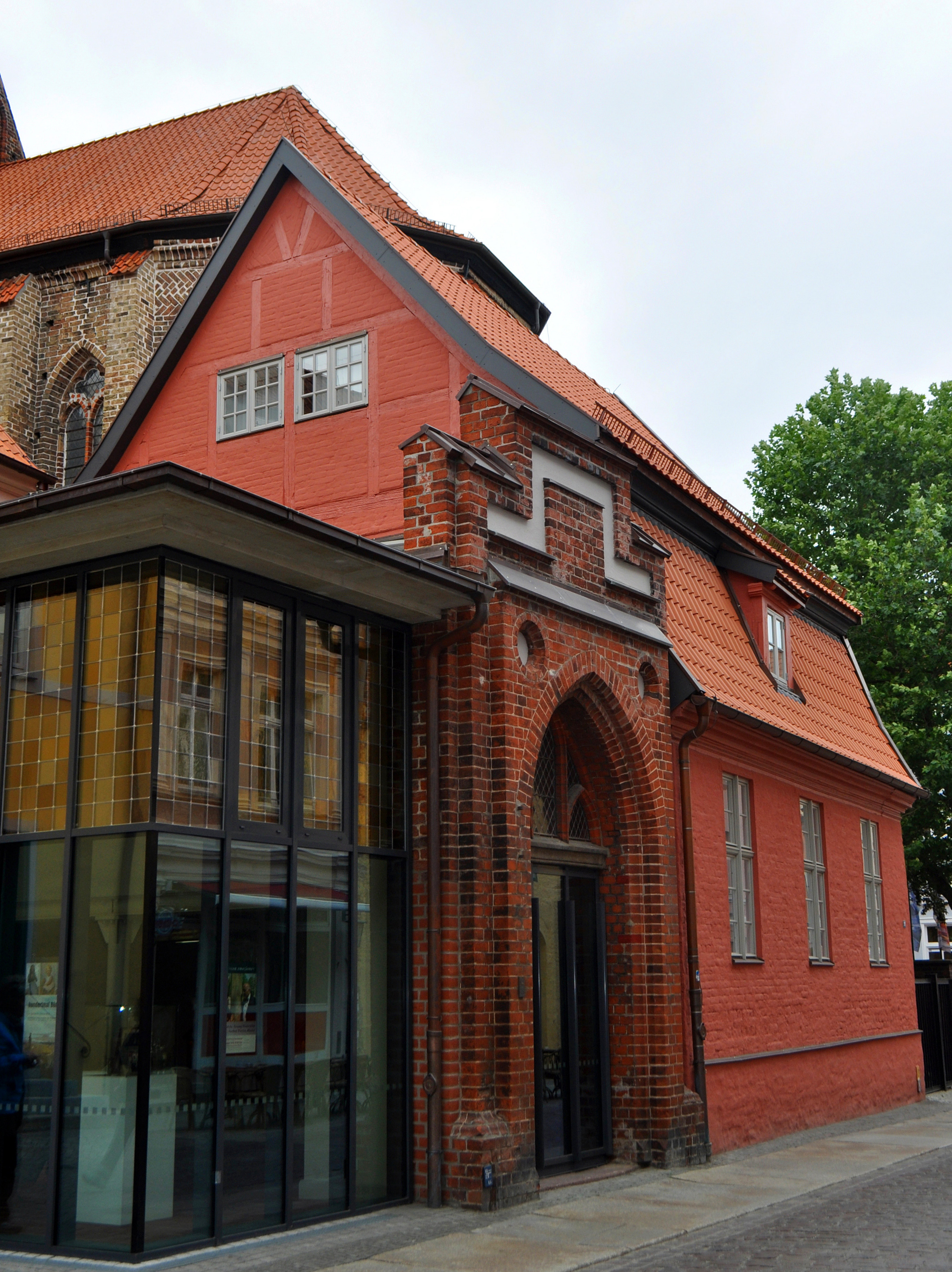 Eingang zum Kulturhistorischen Museum in Stralsund, im ehemaligen Katharinenkloster, das auch als Gymnasium genutzt wurde.